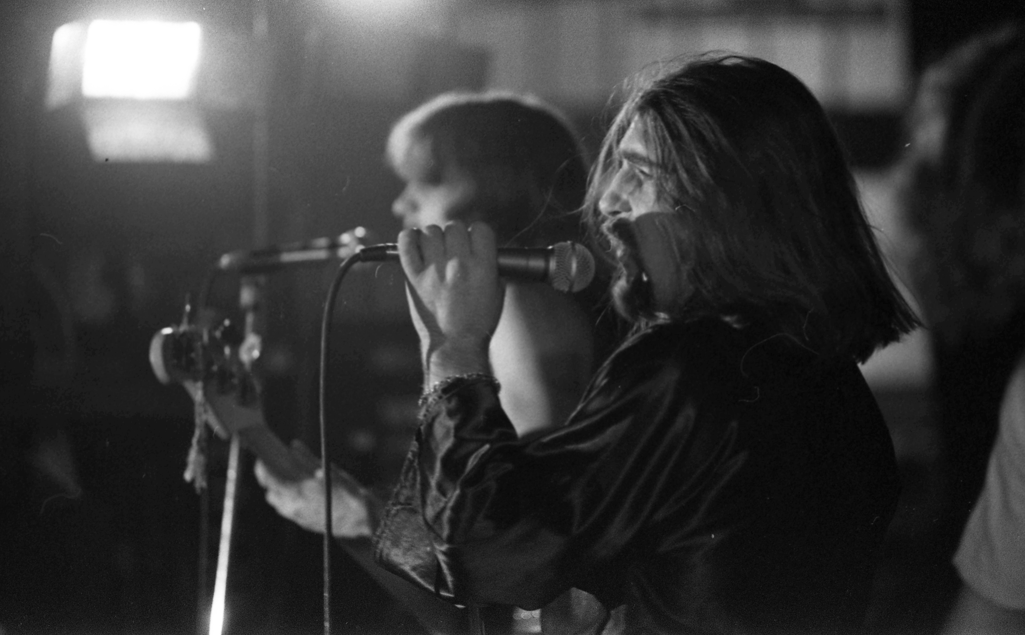 Vikidál Gyula (Budapest, 1948. január 25. –) Liszt Ferenc-díjas magyar énekes.